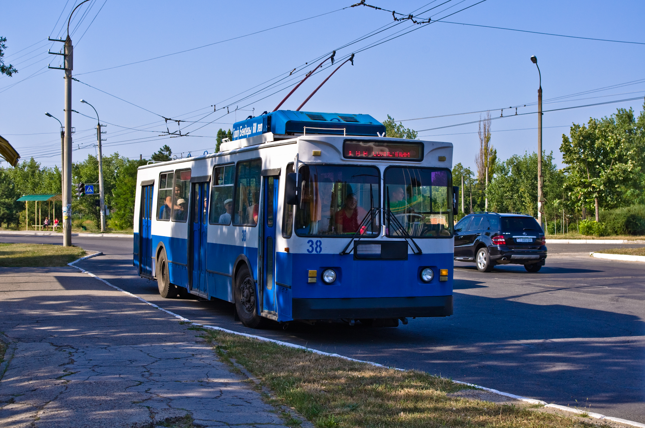 Бендерский троллейбус. Маршрут №1 ул.Лазо - м-н "Солнечный"